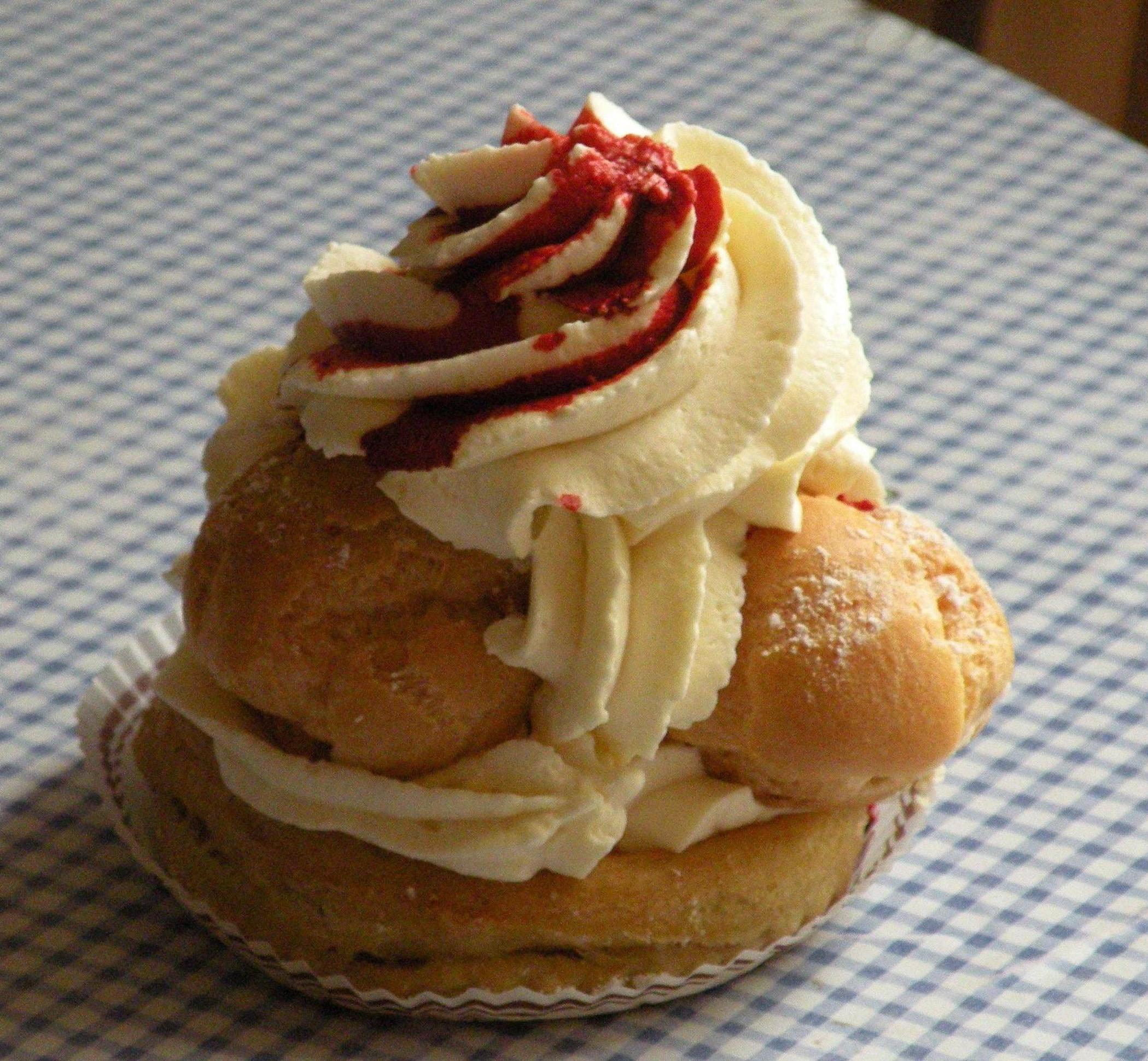 Saint-honoré individuel (pâtisserie)